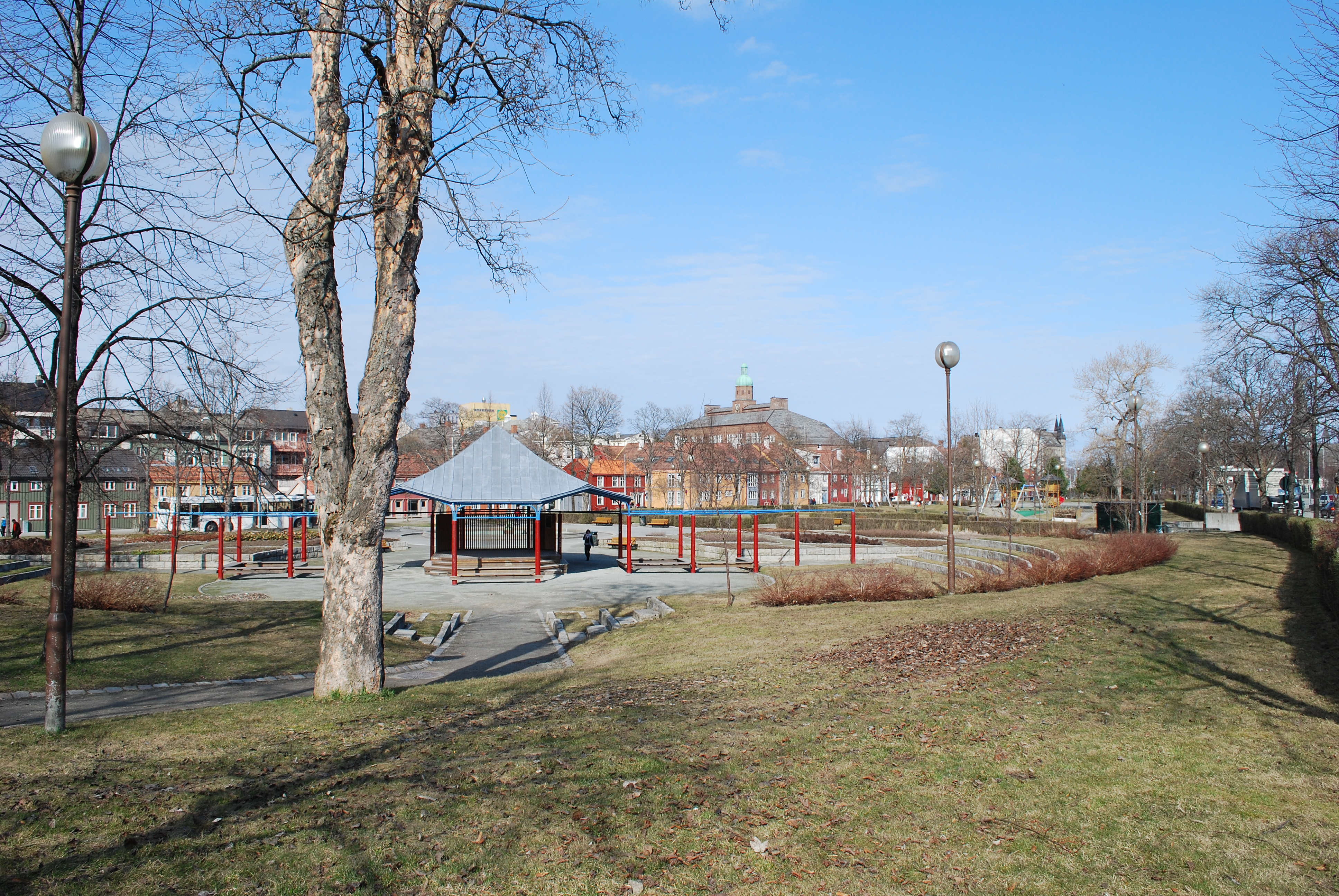 Ilaparken ved Ila i Trondheim sett mot nordøst.